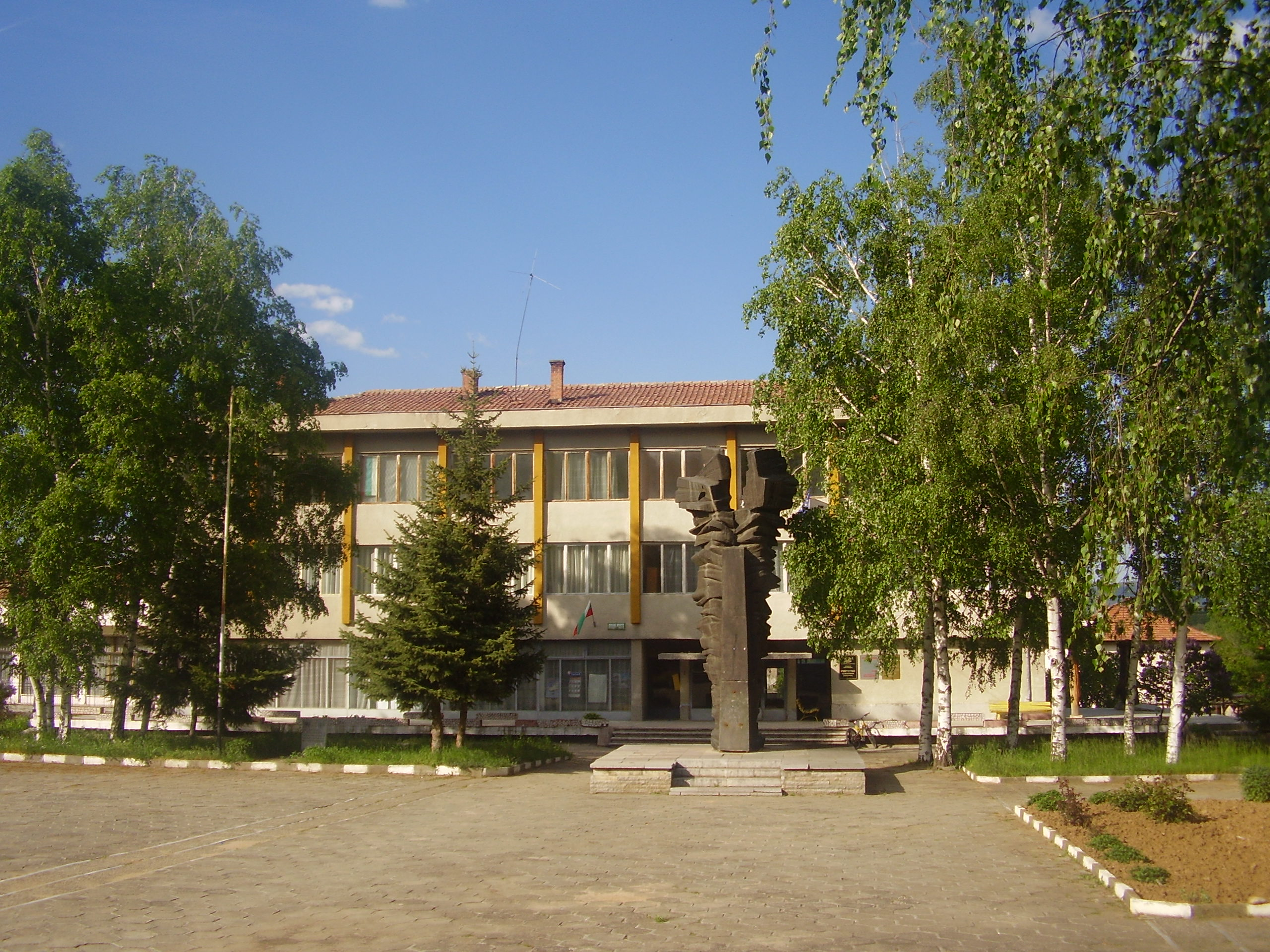 с.Соволяно